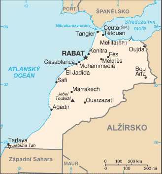 Mapa Maroka - přeložená mapa z CIA World Factbook.